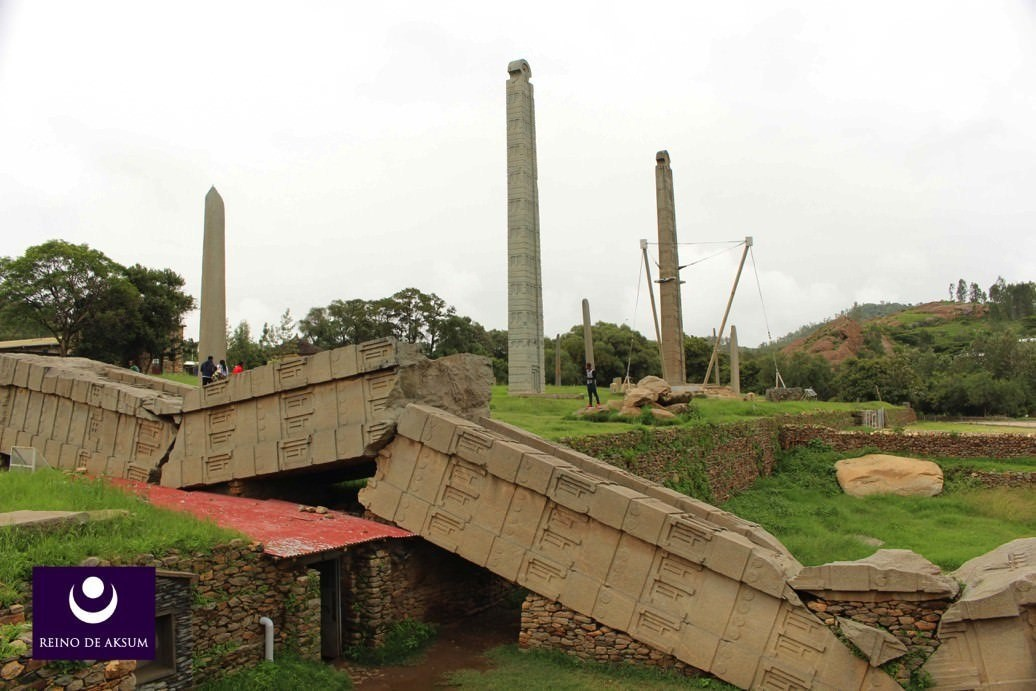 Parque de las Estelas Reino de Aksum